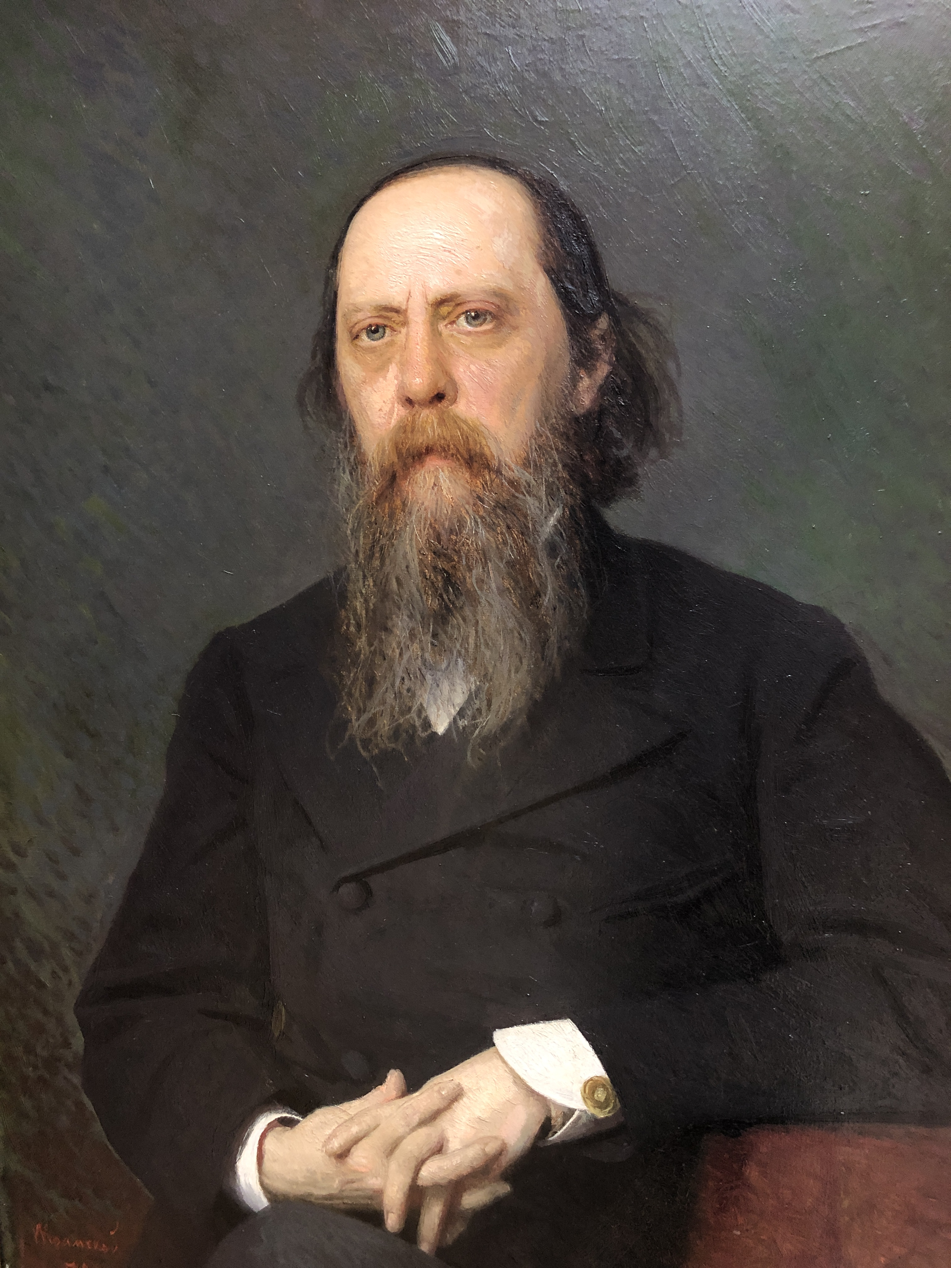 Ivan Nikolaevich Kramskoi - Portrait of the writer Mikhail Saltykov-Schedrin И.Н.Крамской (1837 – 1887) Портрет писателя М.Е. Салтыкова-Щедрина (1826-1889). 1879г, холст, масло, 88 х 68см Государственная Третьяковская галерея, Москва Исполнен по заказу П.М.Третьякова. Авторское повторение портрета находится в музее Института русской литературы.